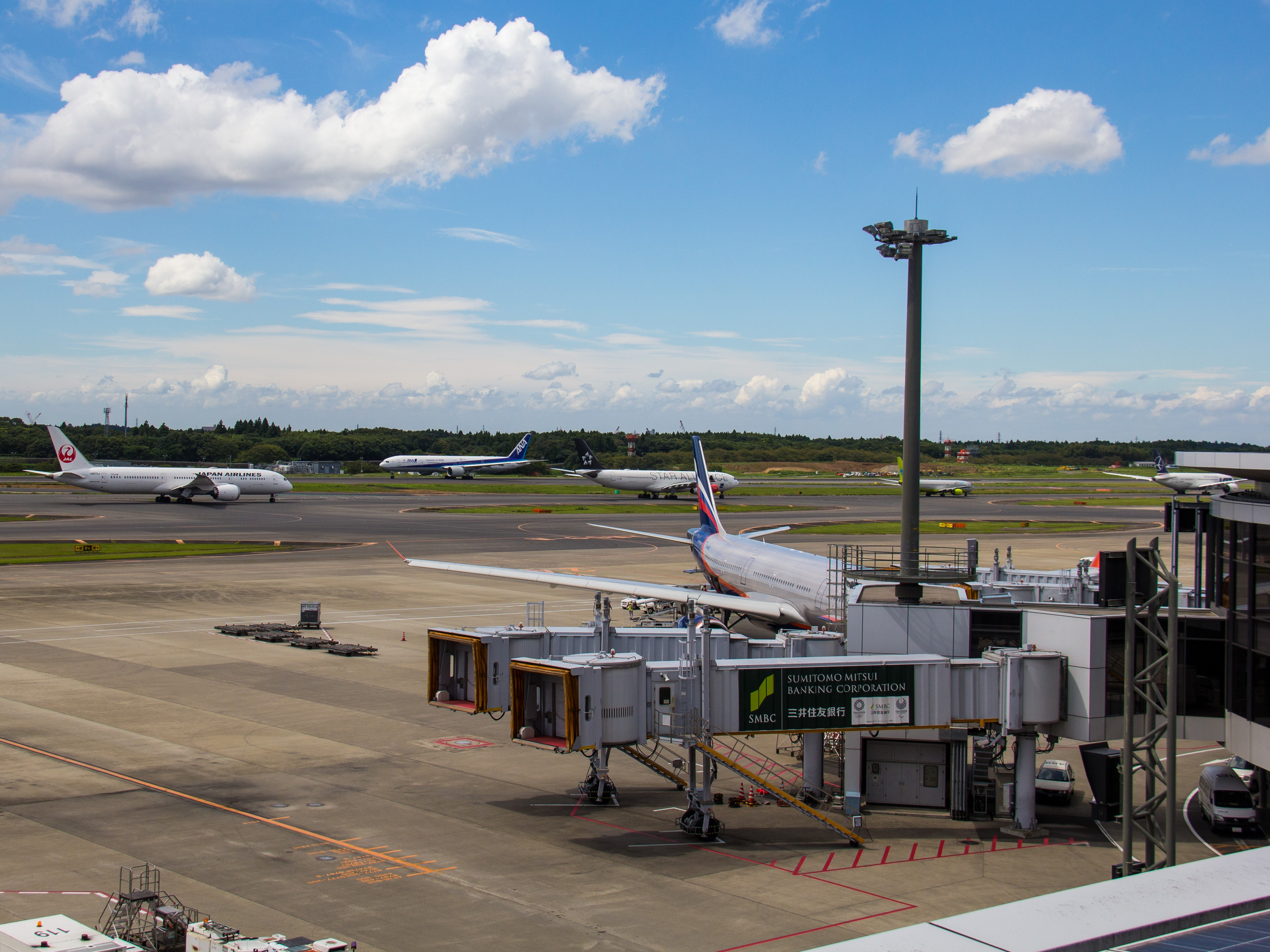 成田市天浪